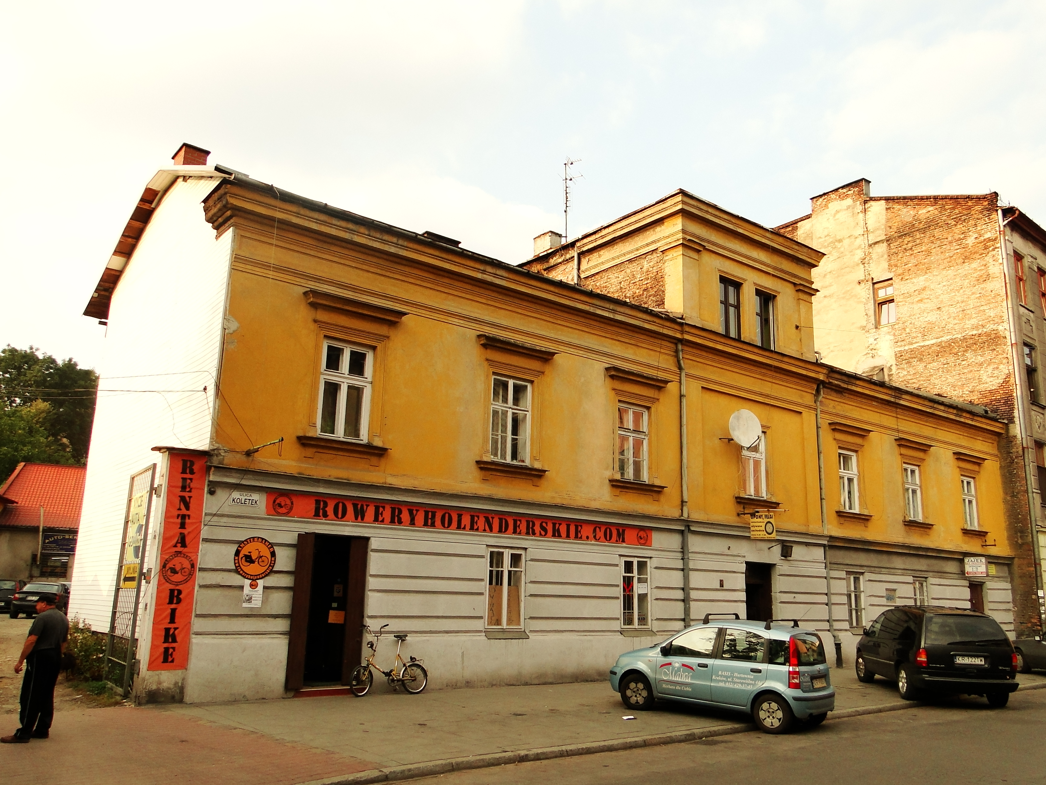 dworek kanonika Dubieckiego Kraków, ul. Koletek 9, Kraków